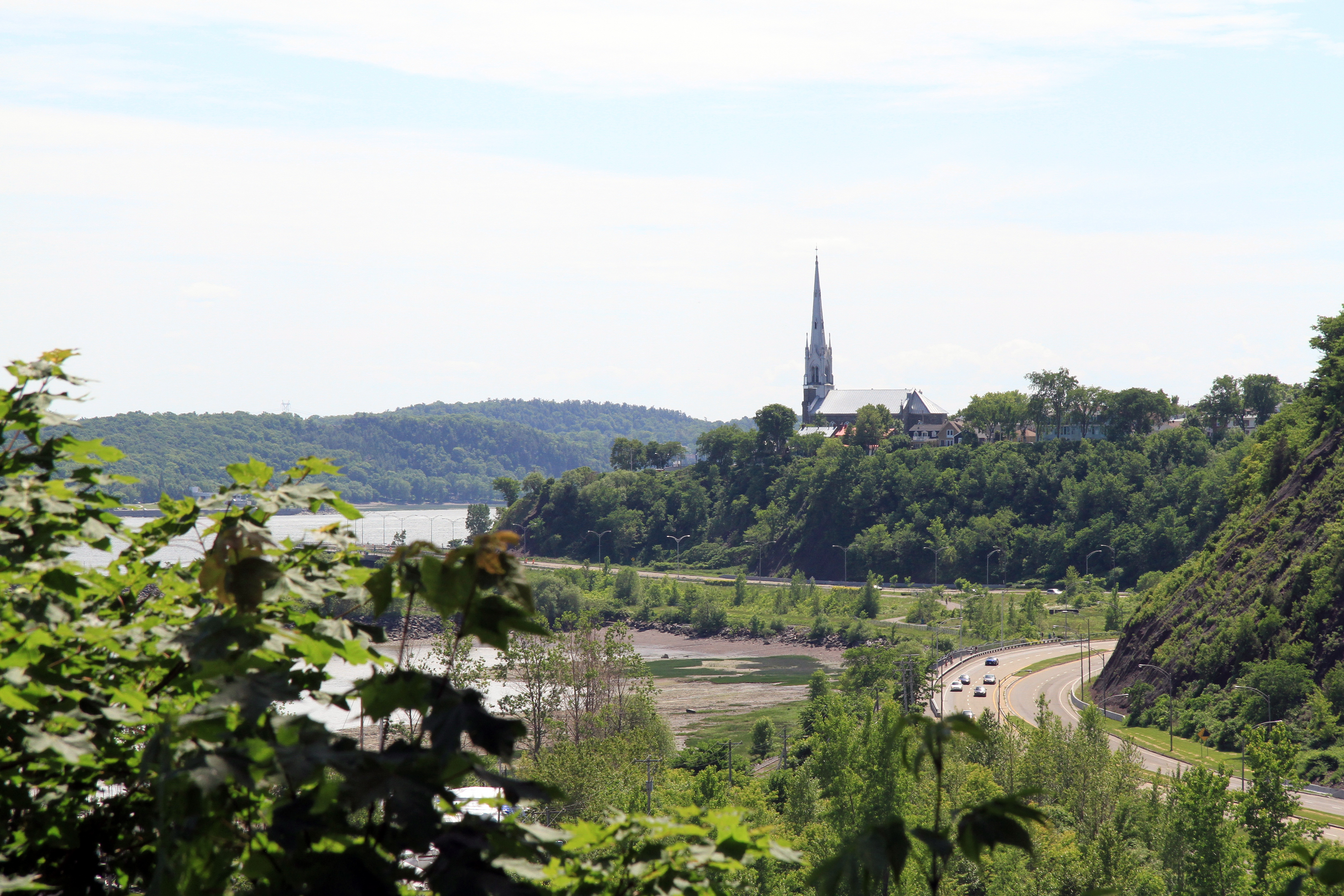 Vue du belvédère